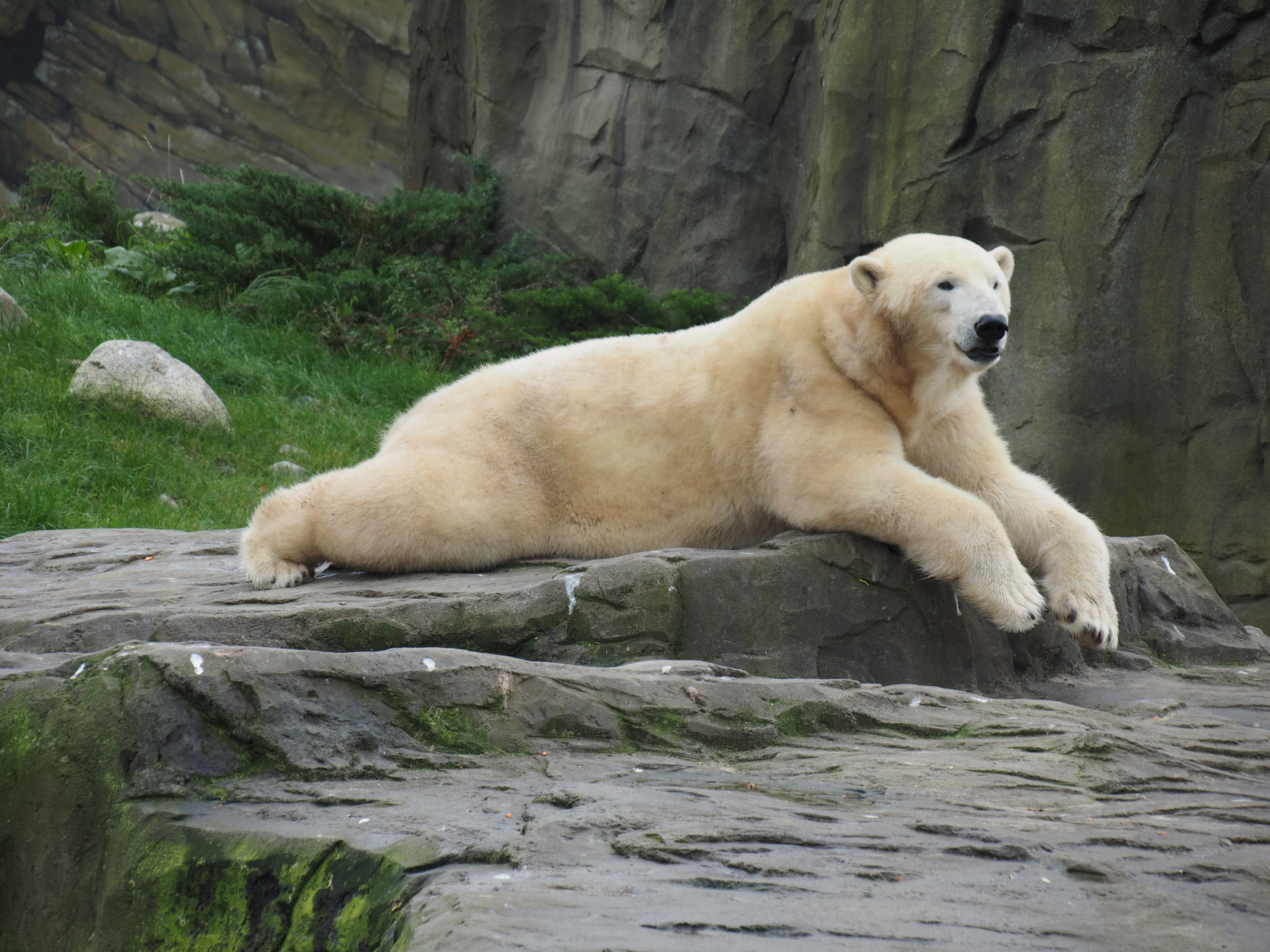 Eisbär (Ursus maritimusim) im Polarium des Rostocker Zoos